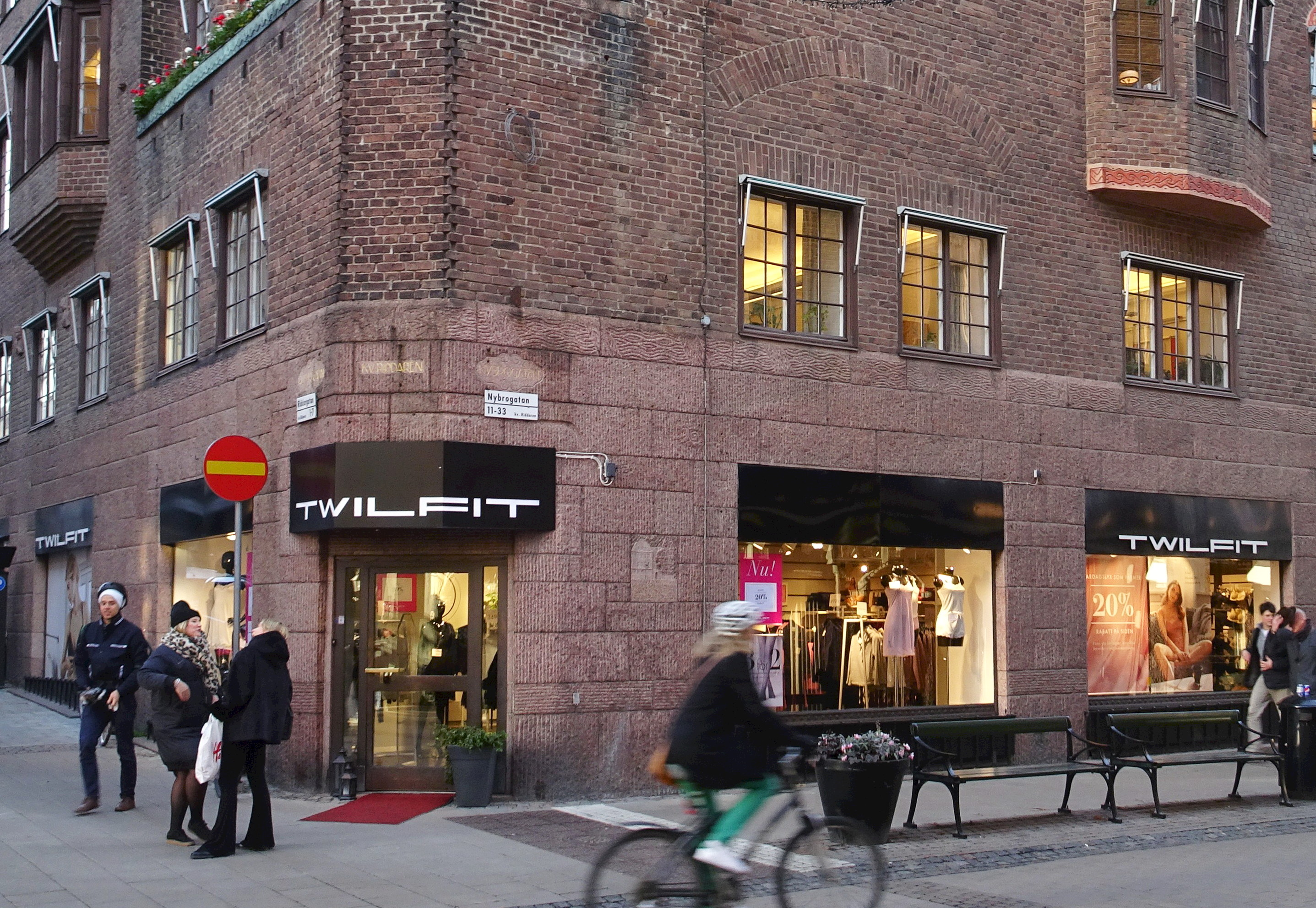 Twilfits stamhus i Riddaren 17